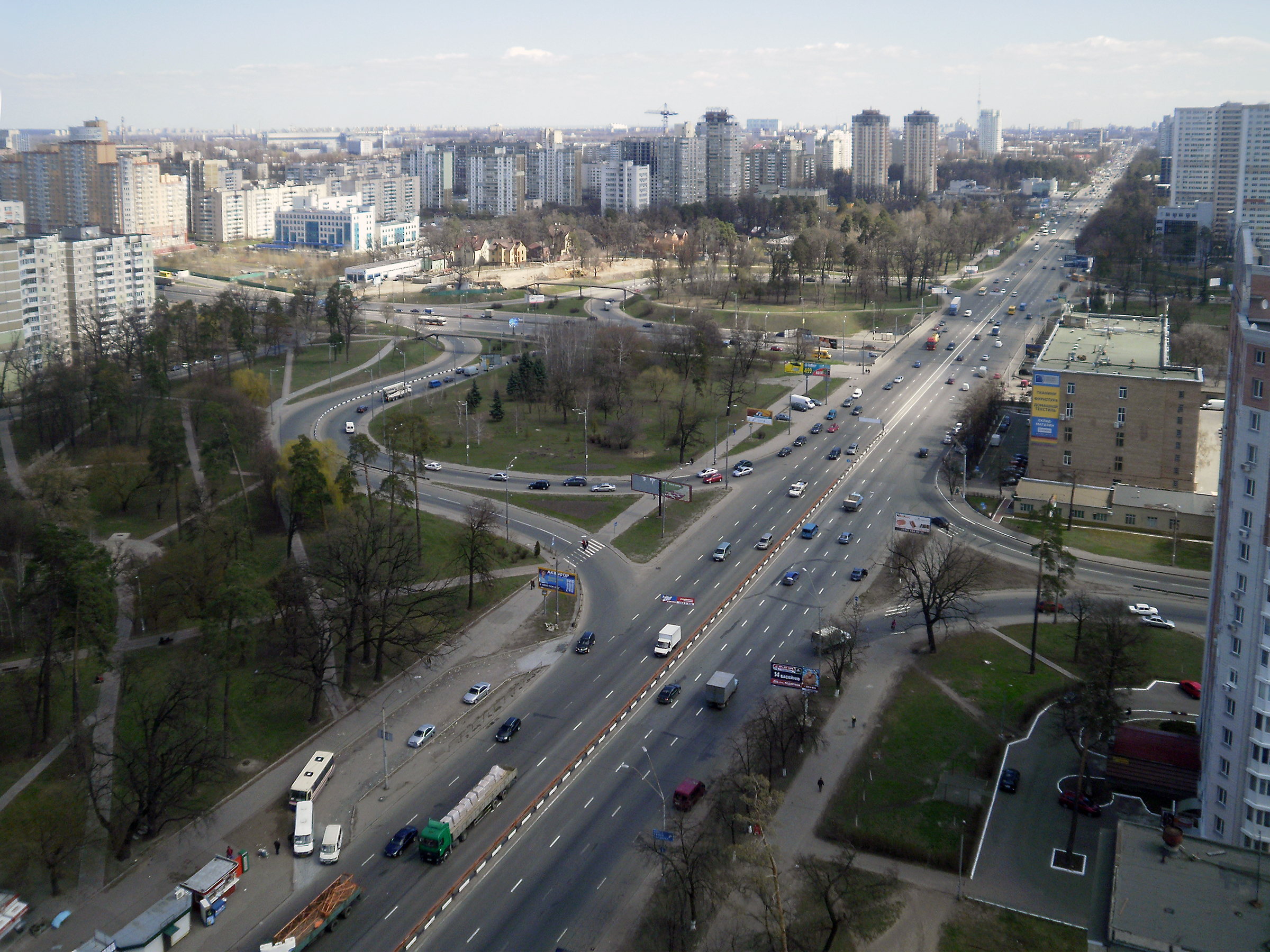 в Киеве